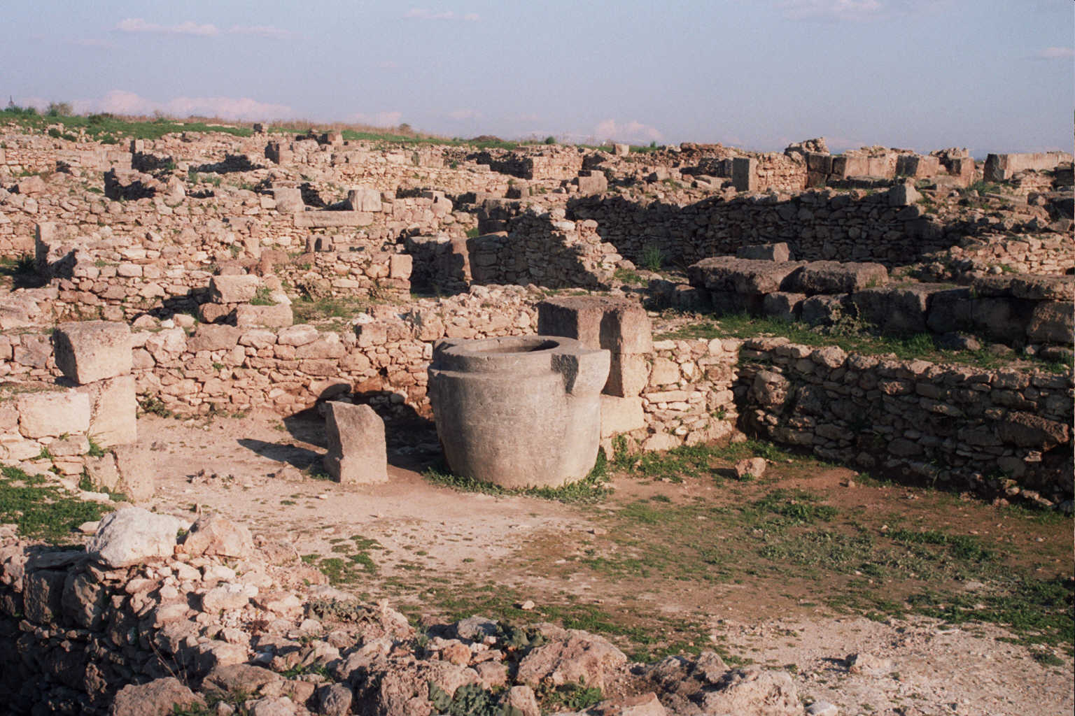 Viaggio in Siria 2005